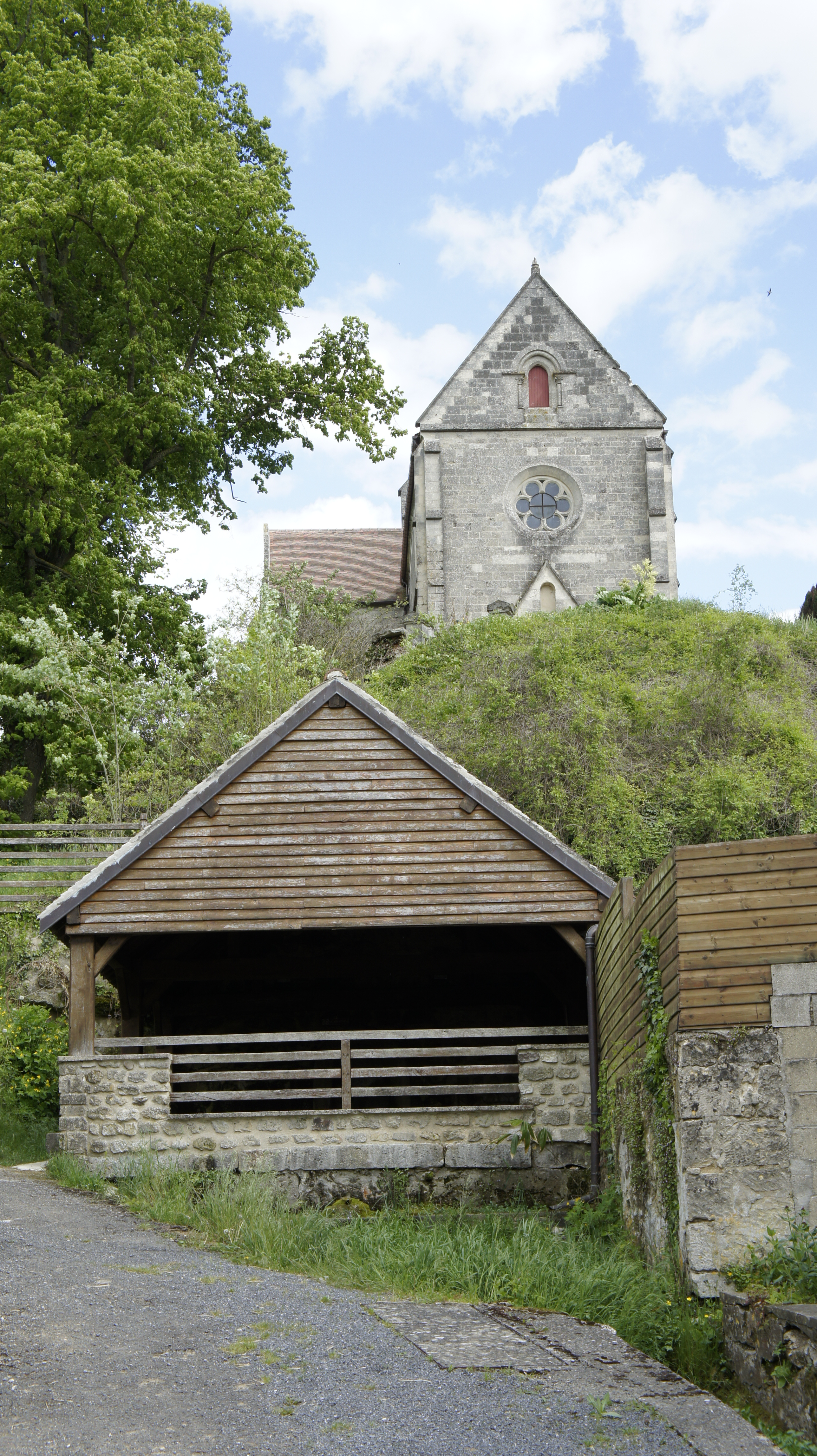 Lavoir avec en arrière plan l' église .